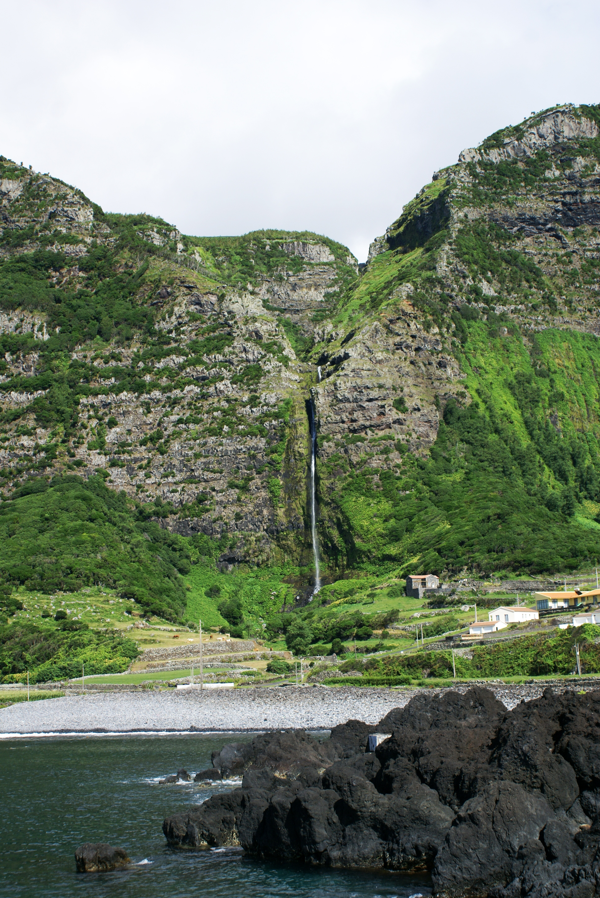 Cascata do Poço do Bacalhau, Fajã Grande, Arquivo de Villa Maria, ilha Terceira, Açores